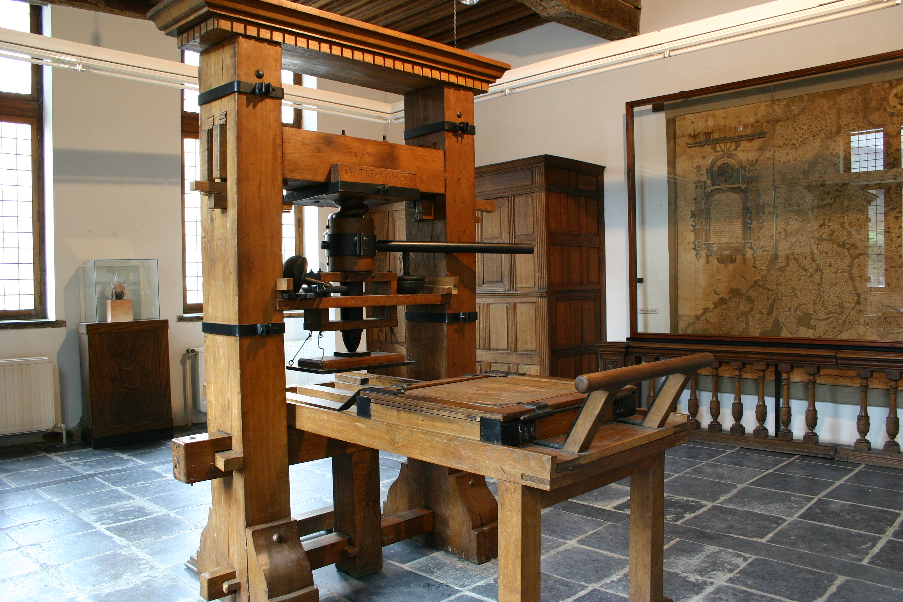 Replica van een drukpers in het stedelijk museum 't Gasthuys Aalst